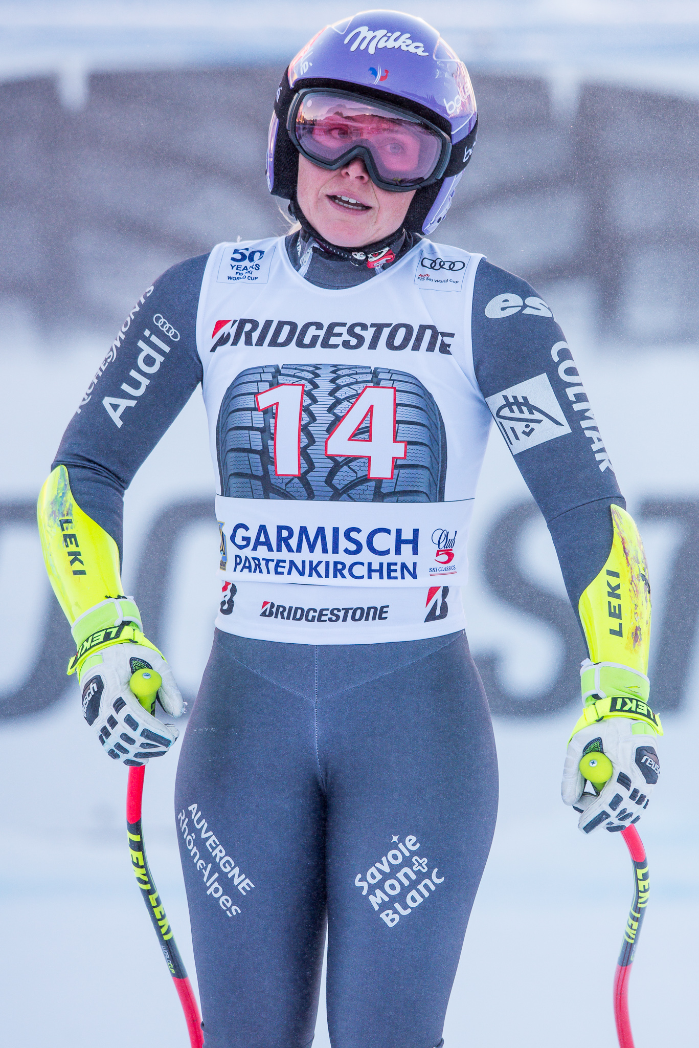 64. Kandahar Rennen,Audi FIS Ski Weltcup Garmisch-Partenkirchen,Damen Super-G,Kandahar,Ladies Super-G,Tessa Worley